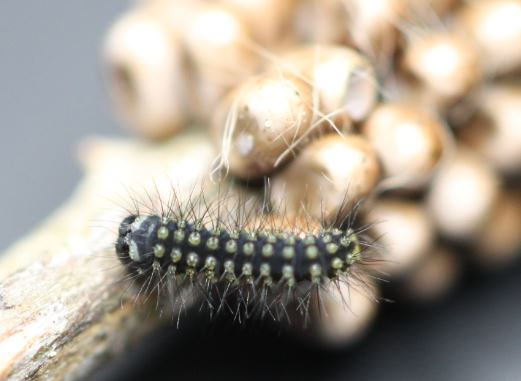 Frisch geschlüpfte Raupe des Kleinen Nachtpfauenauges (Saturnia pavonia), am 29. April 2018 aus Eiern gefunden in der Schwetzinger Hardt